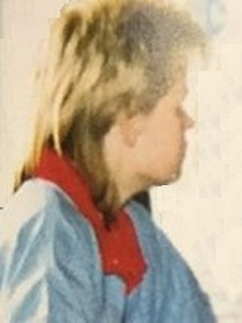 Kerstin Kunze (1990), Ausschnitt aus einem Foto der Seite 71 eines Buches von Erich Krüger, der mir die Erlaubnis gab, das Foto für Wikipedia zu verwenden.